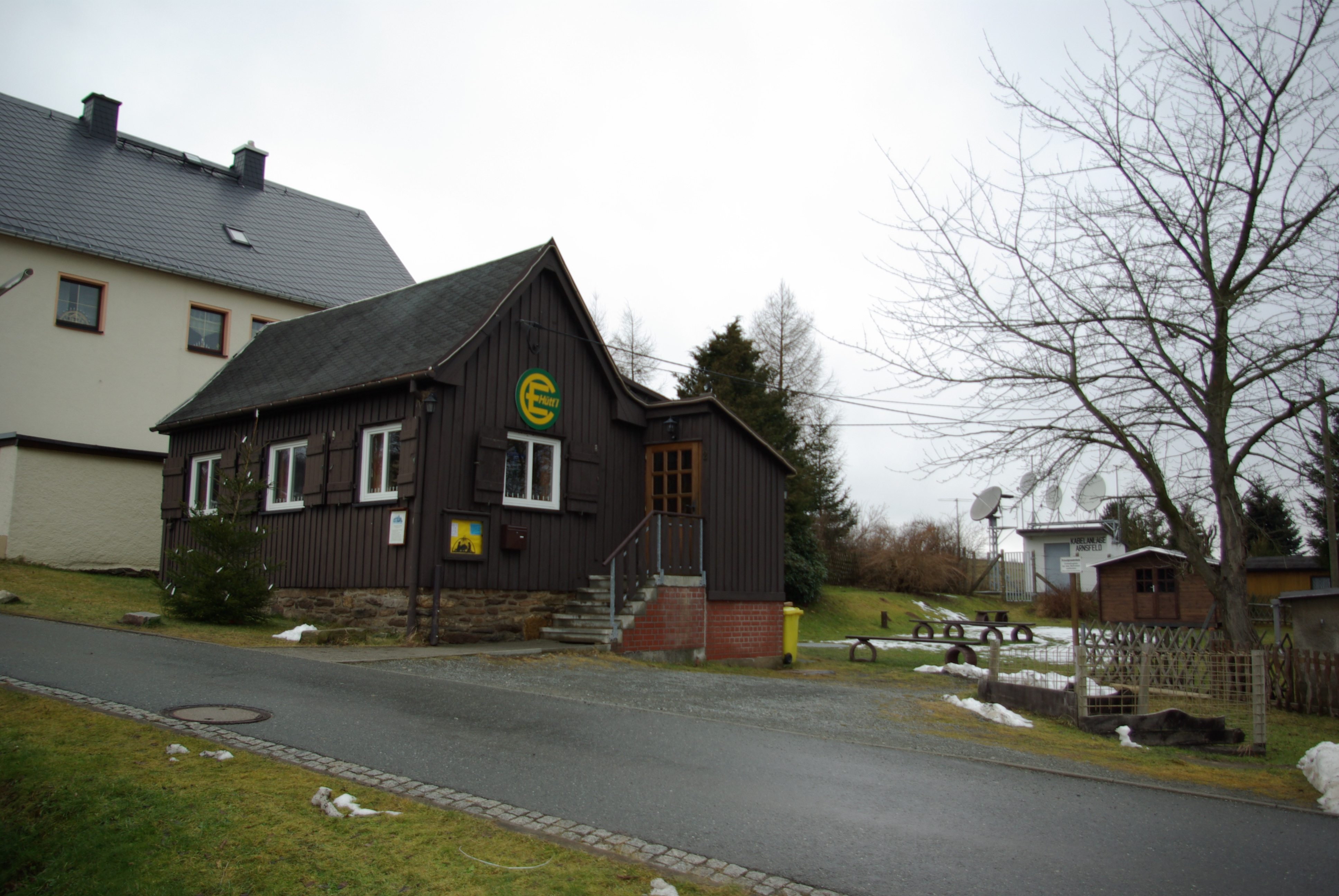 EC Hüttl